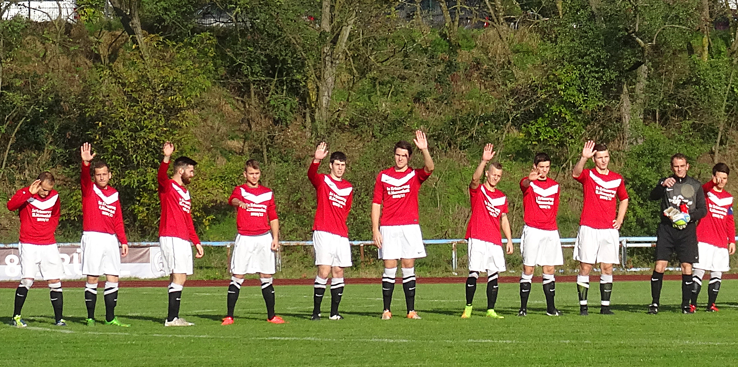 Deutschland: Spieler des FV 1918 Brühl vor einem Verbandspokalspiel 2014/15 gegen den FC Nöttingen 1957